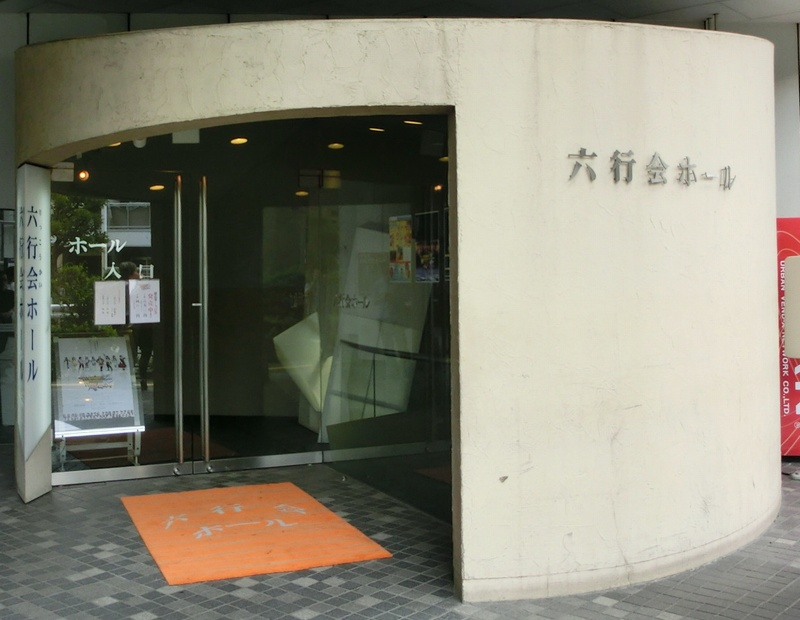 Rikkouka hall (Shinagawa, Tokyo, Japan)